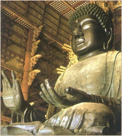 Статуа Рушана буде у Нари